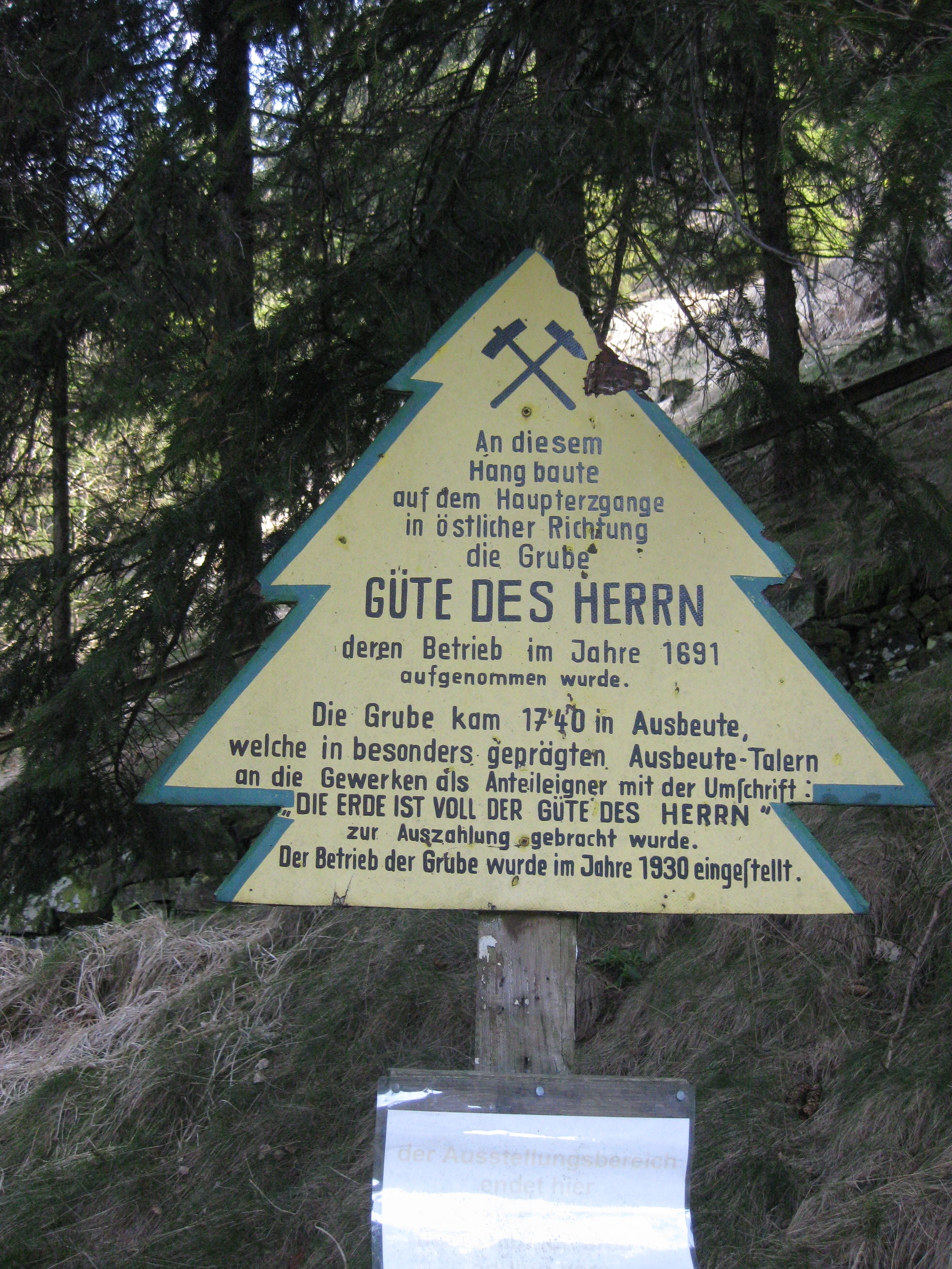 Dennert-Tanne an der Grube Güte des Herrn in Lautenthal/ Harz